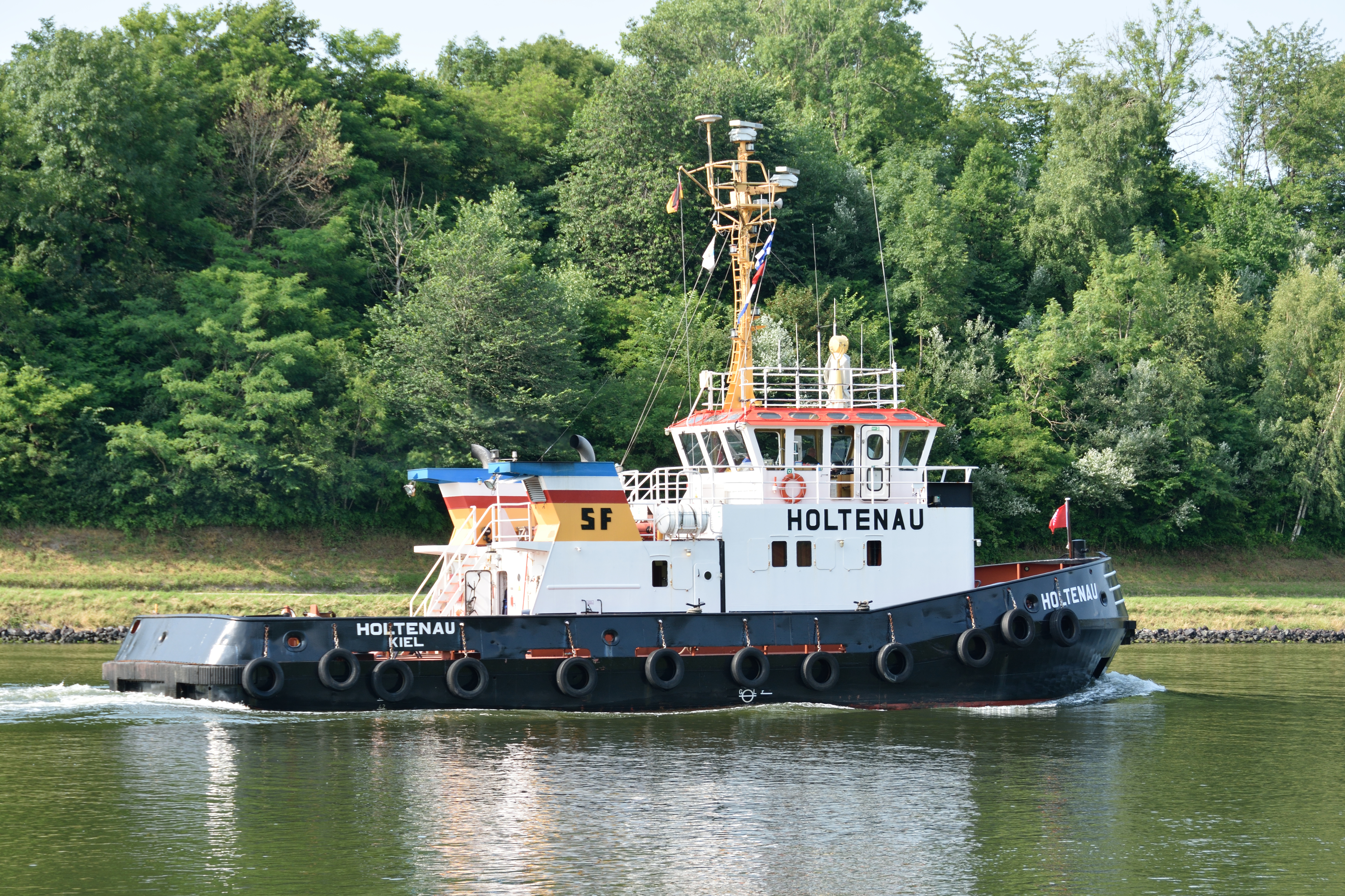 Schlepper "Holtenau" (IMO 8200321) im Nord-Ostsee-Kanal.